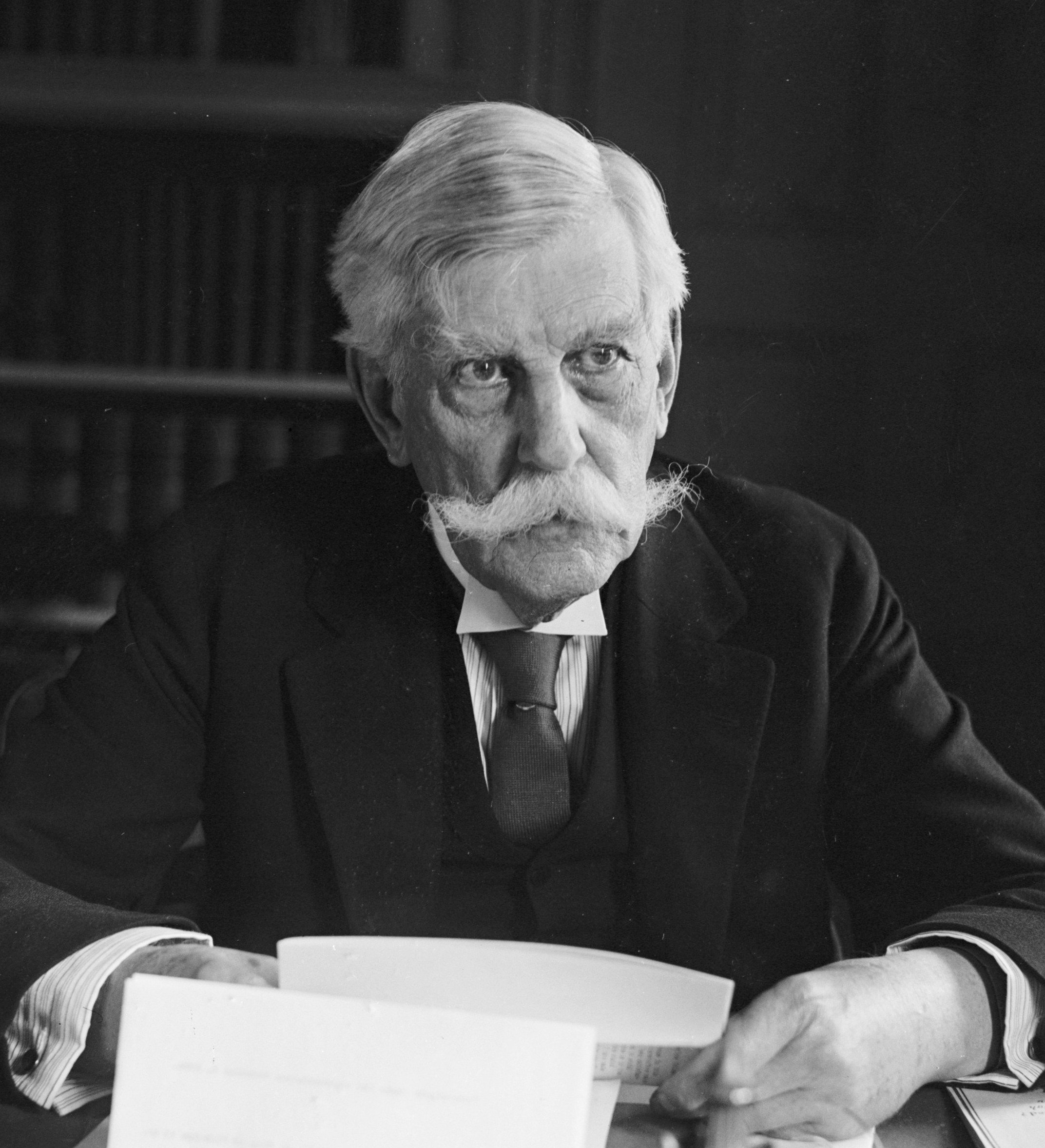 Oliver Wendell Holmes, Jr.